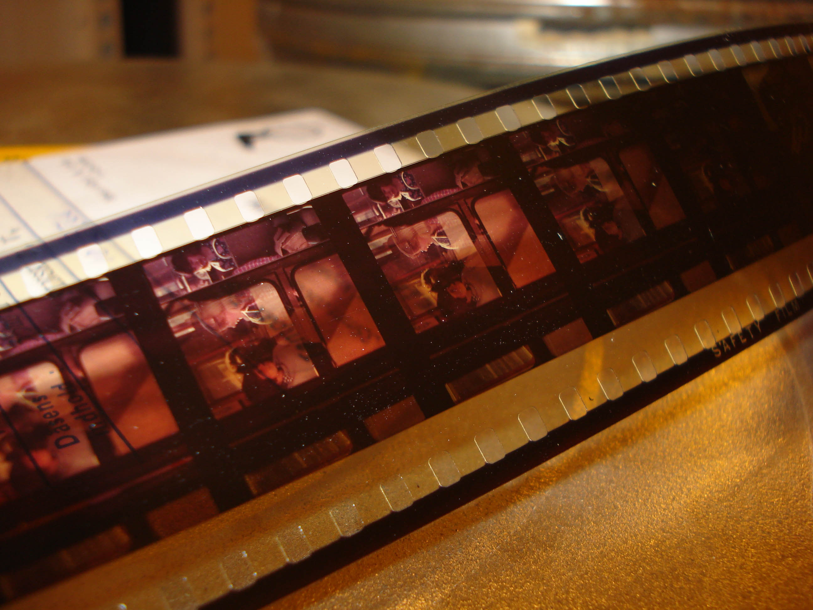 Filmstrimmel fra Statsbibliotekets samling af danske reklamefilm.